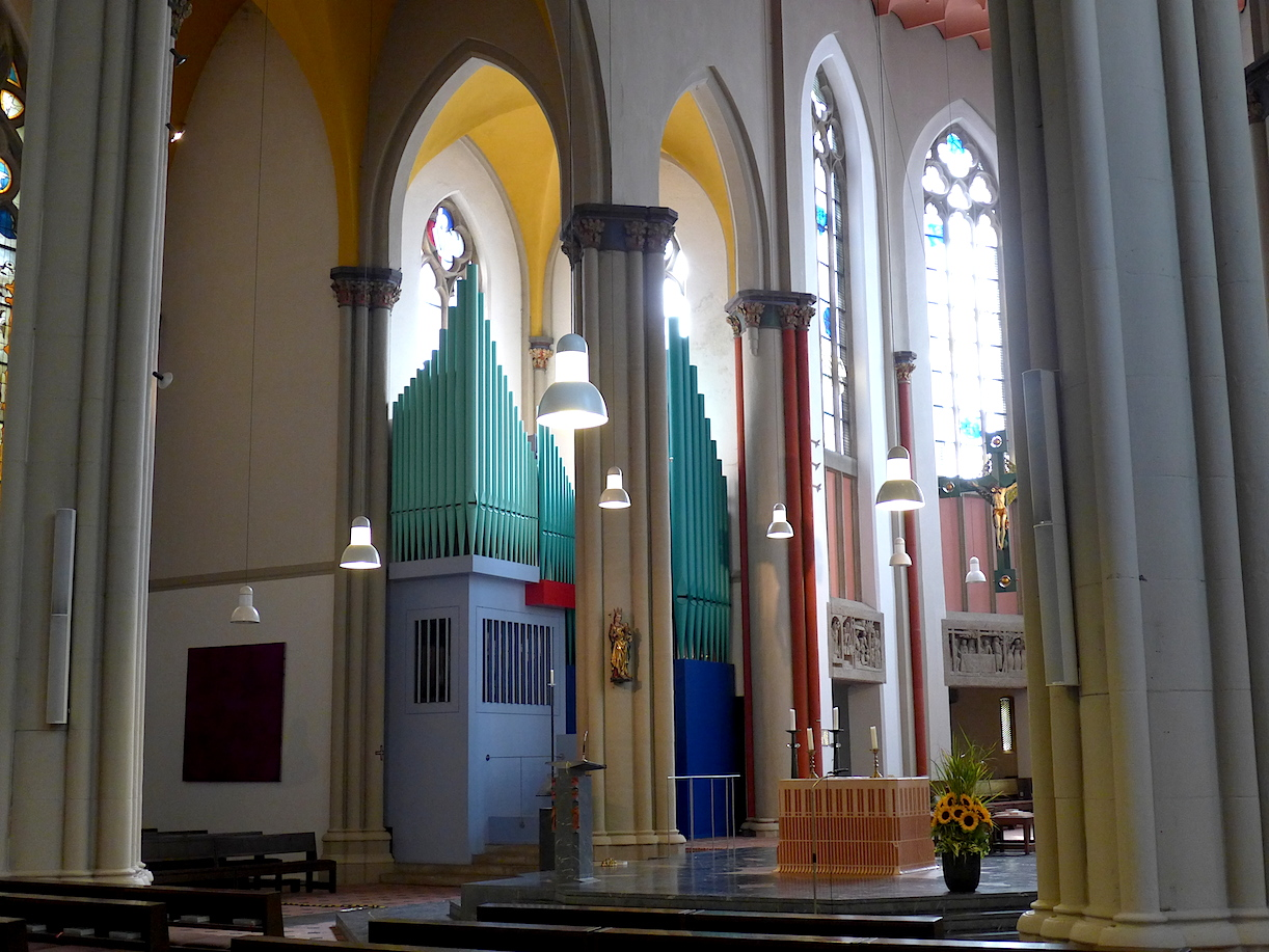 Католическая церковь Успения Божией Матери, Дюссельдорф-Флингерн. 7 августа 2015.